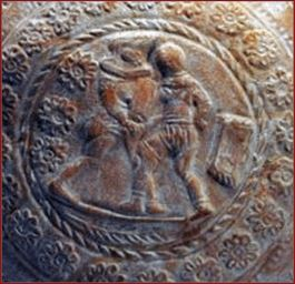 Pilgerflasche, Fundort südlicher Mittelmeerraum, 2-3Jh. n.Chr.